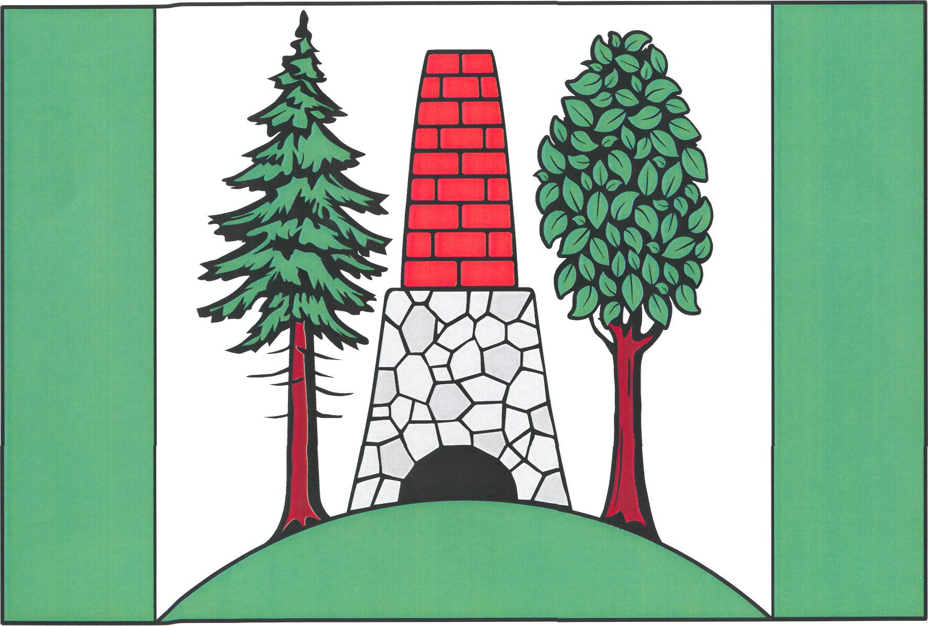 Vlajka obce Lažánky